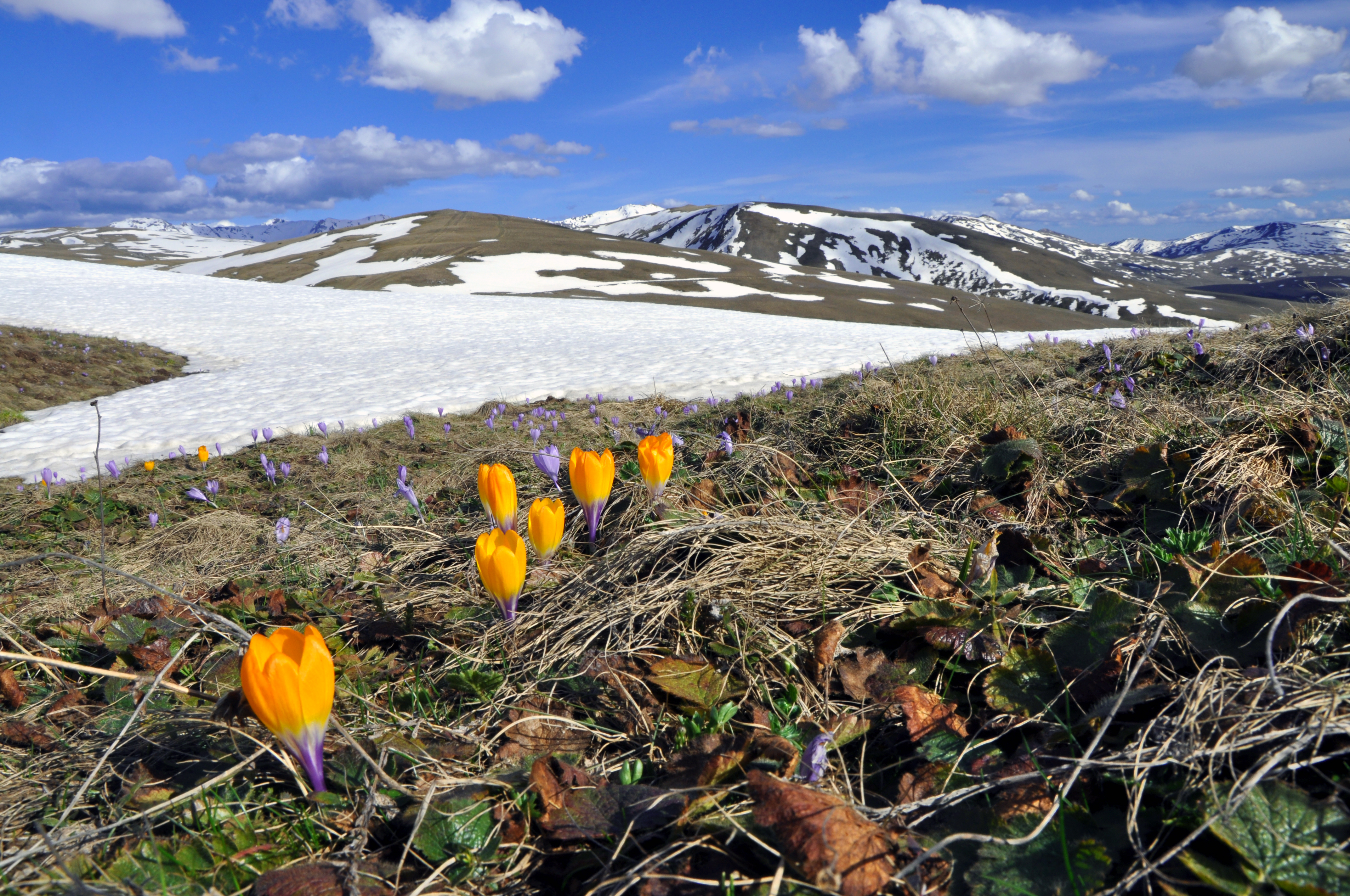 Parku Kombëtar Sharri, Prizren Suharekë Kaçanik Shtërpcë, Dragash